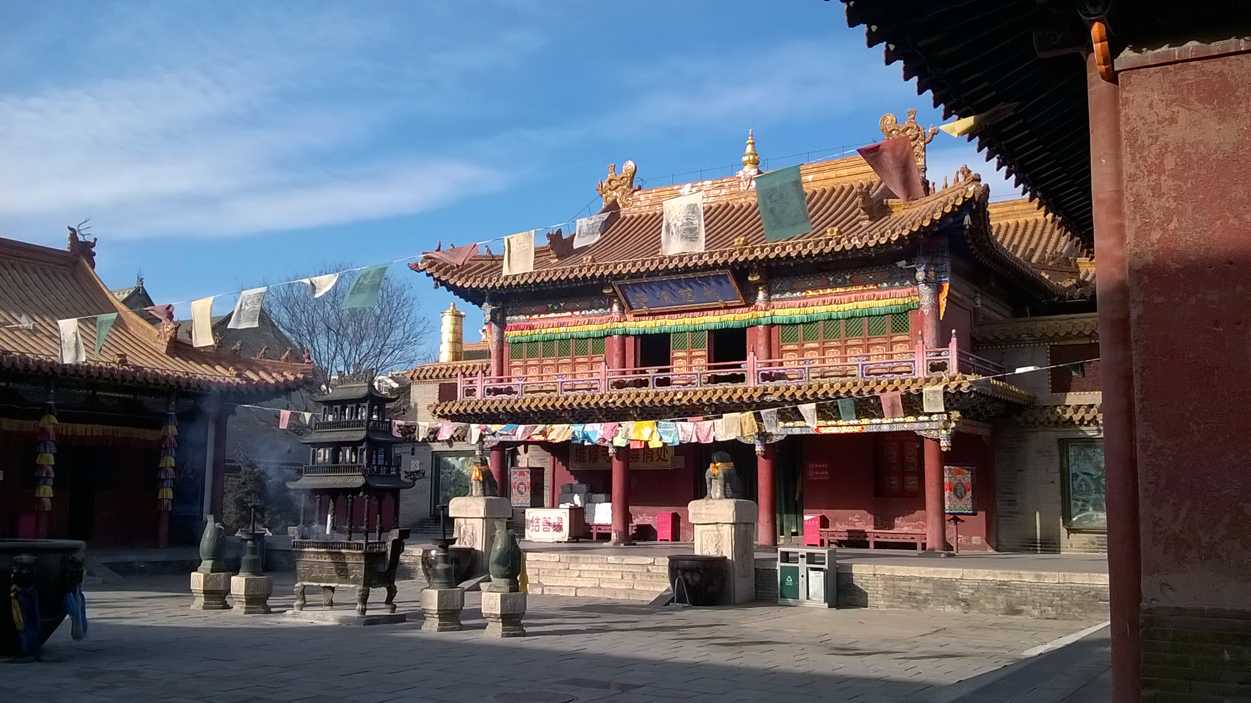 大召大雄宝殿。